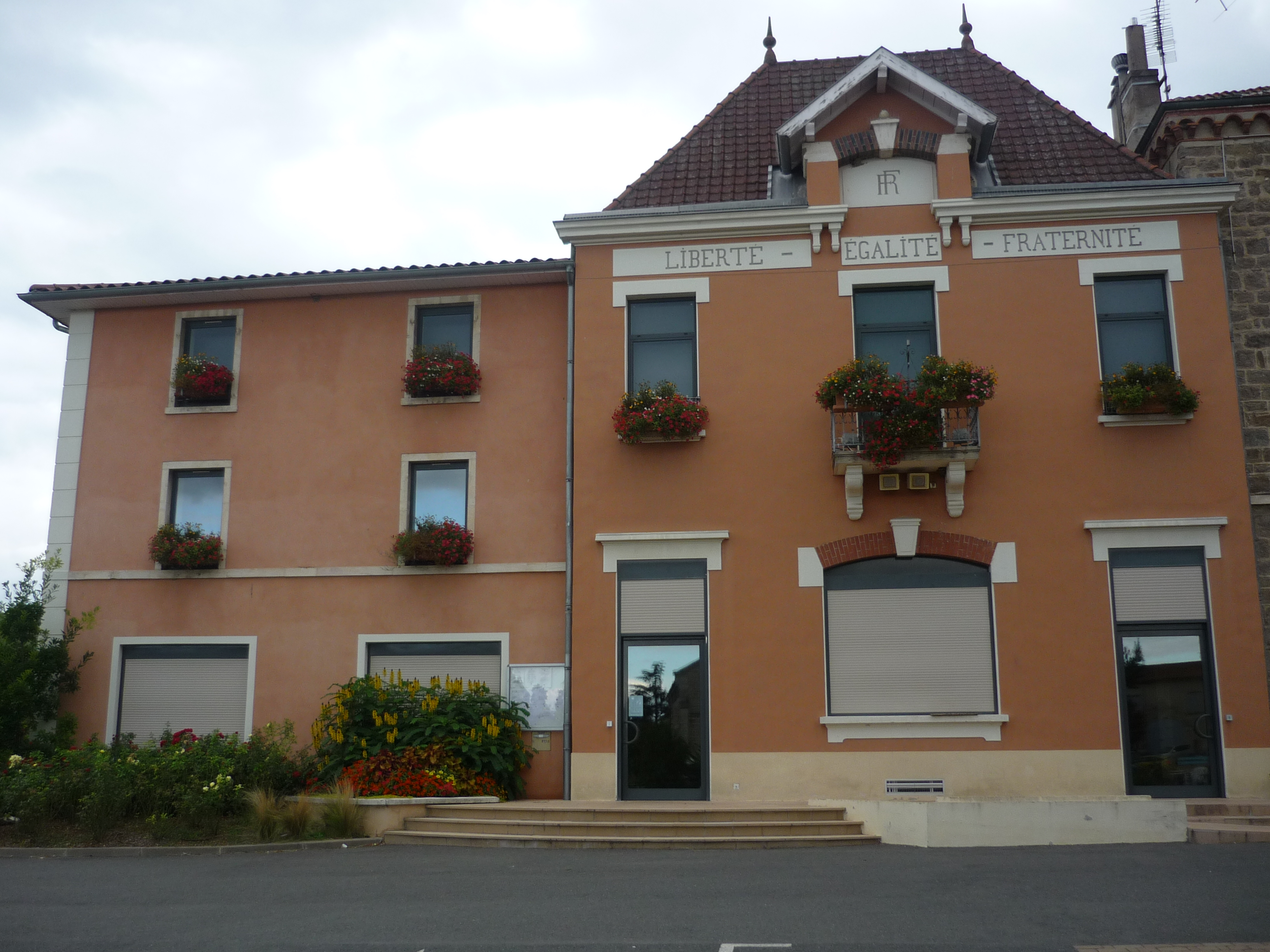 Mairie de la commune du Perréon dans le département du Rhône